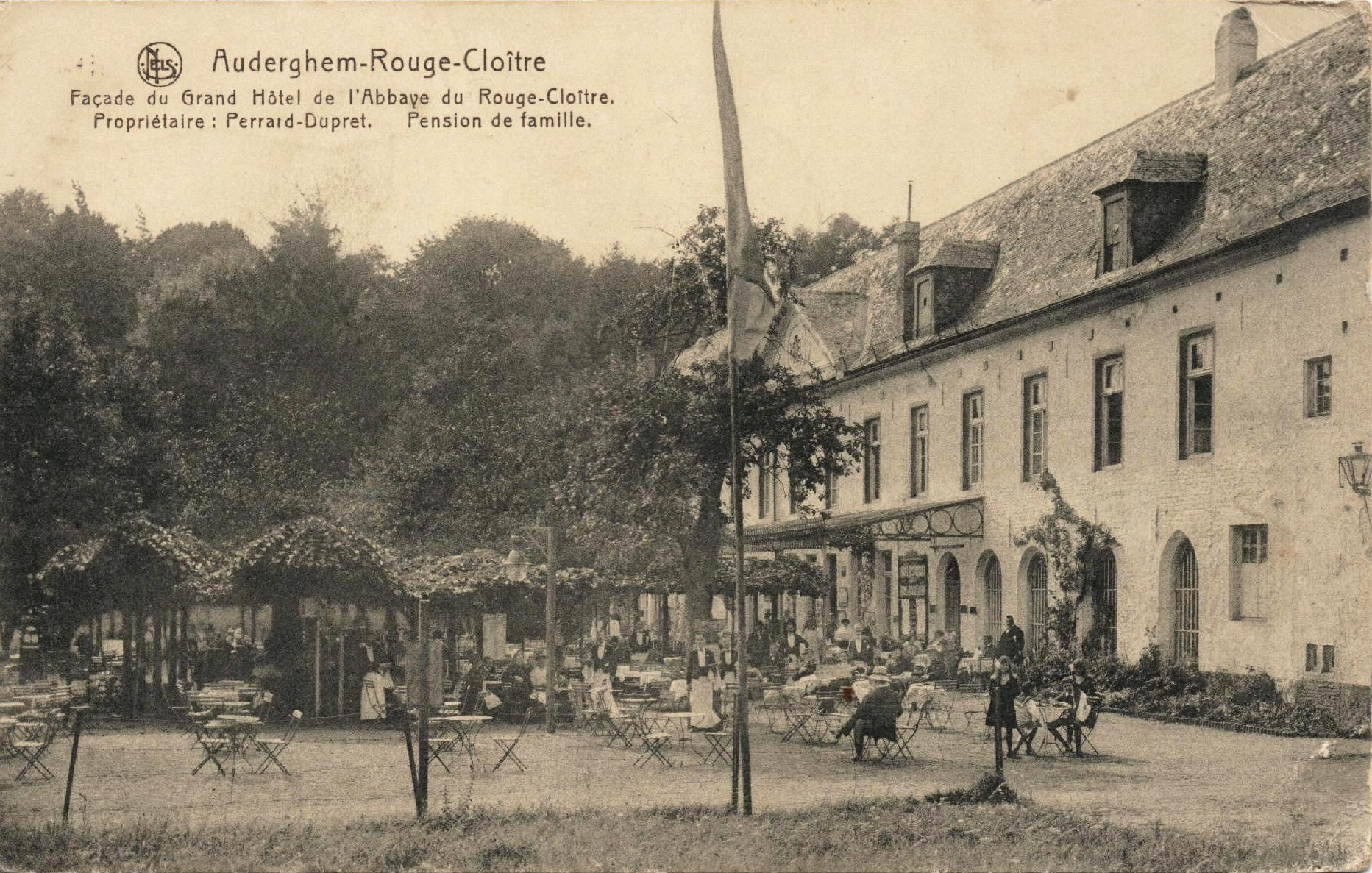 Façade du Grand hôtel de l'Abbaye du Rouge-Cloître à Auderghem. Propriétaire : Perrad-Dupret. Carte postale oblitérée le 29 mai 1920.